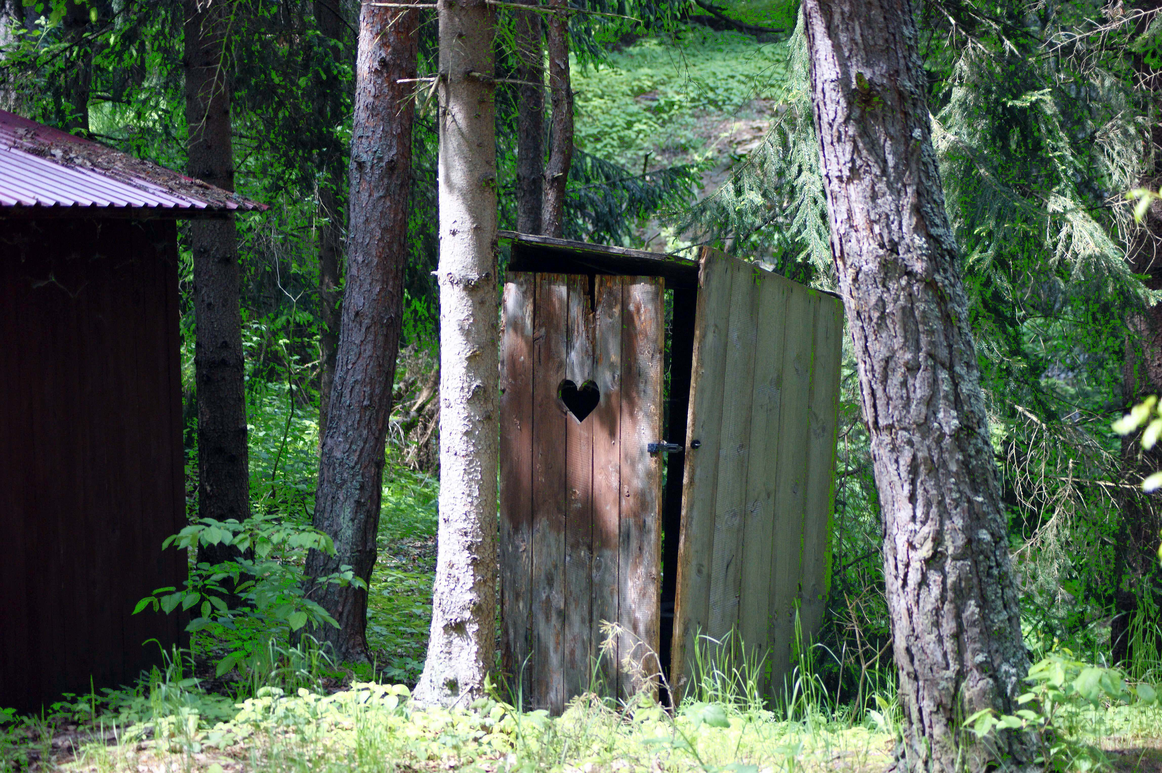 super toiletten